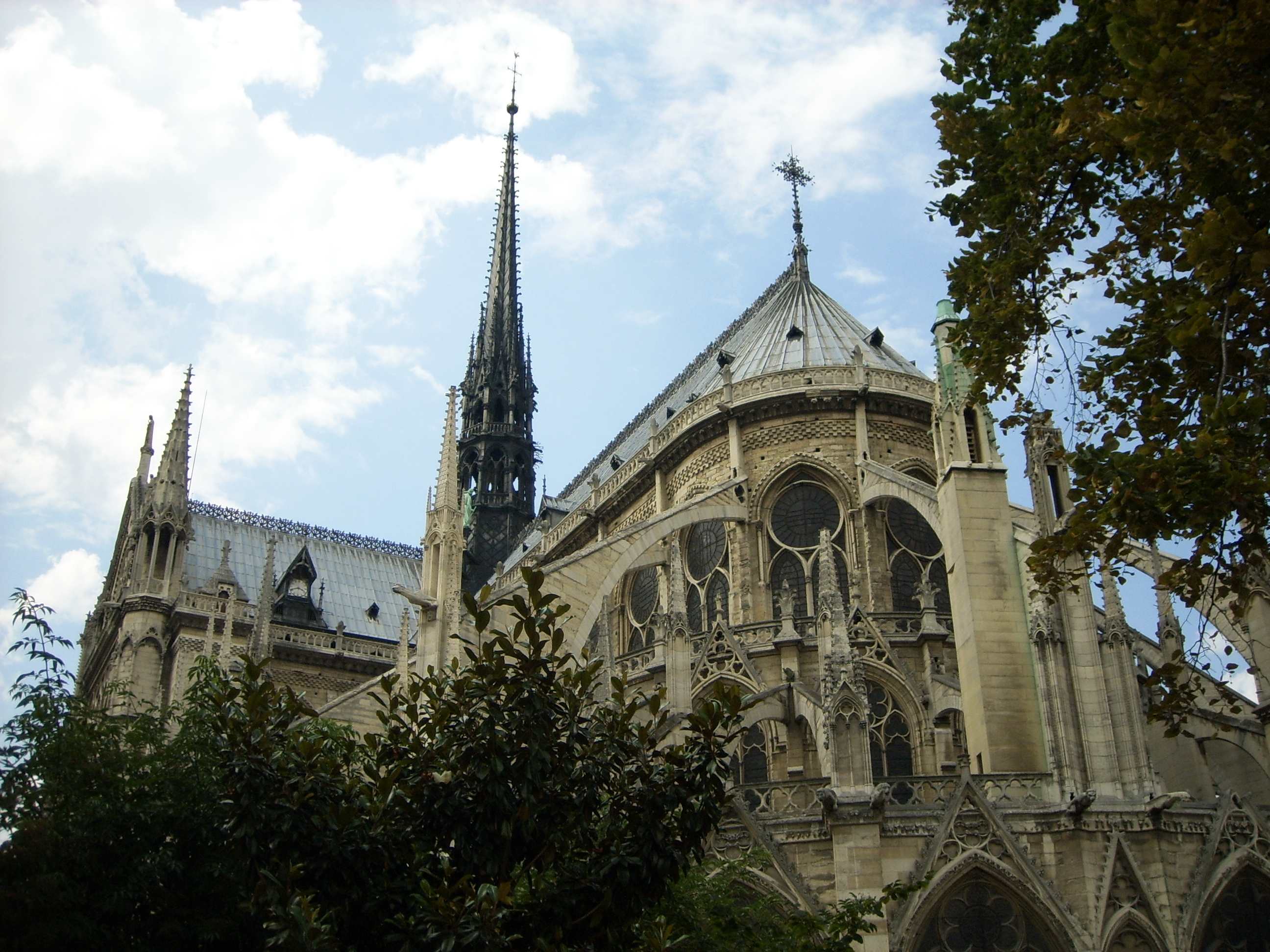 Notre Dame